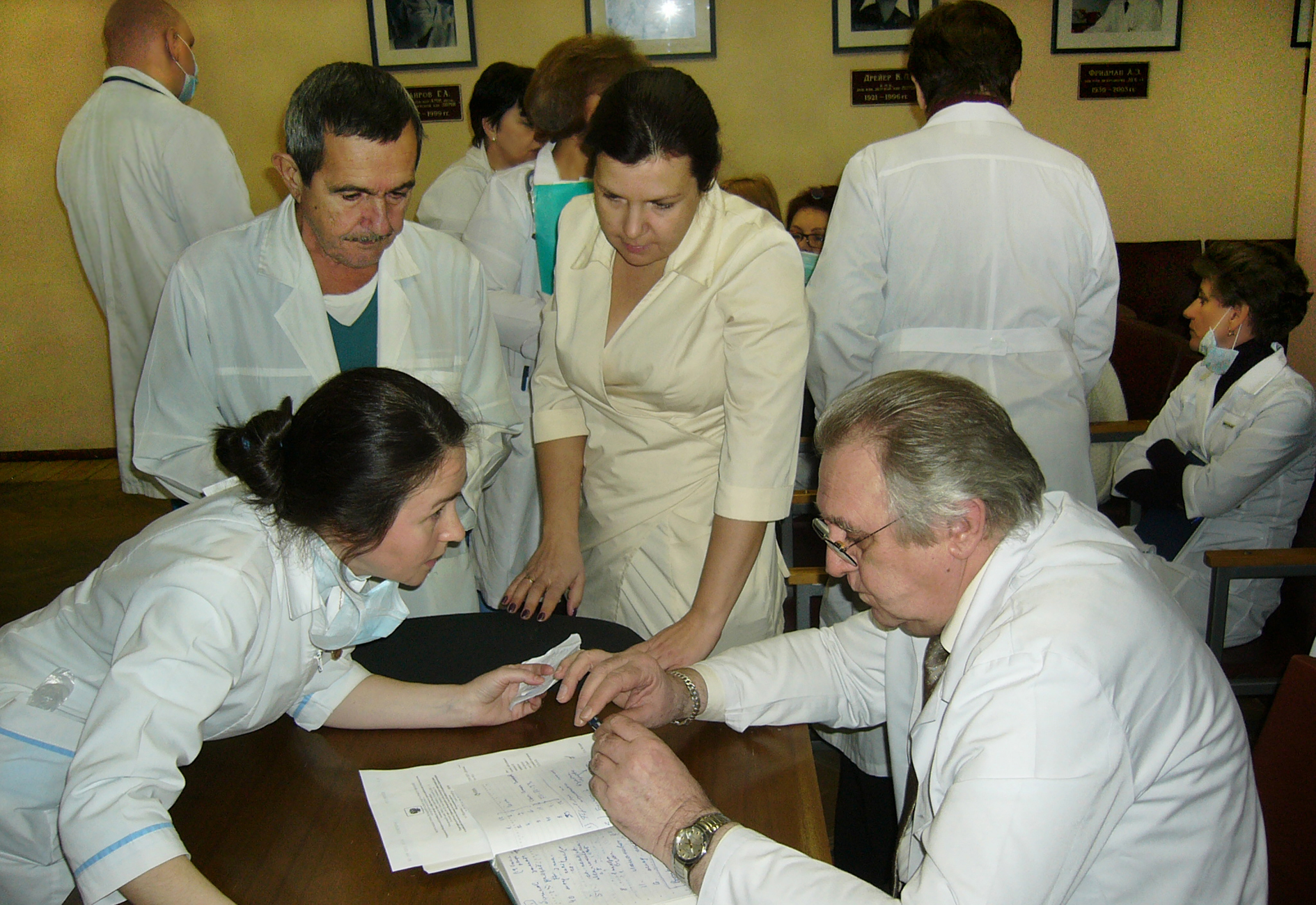 Утренняя конференция в ДГБ № 1. Проводит начмед Павел Борисович Коренев